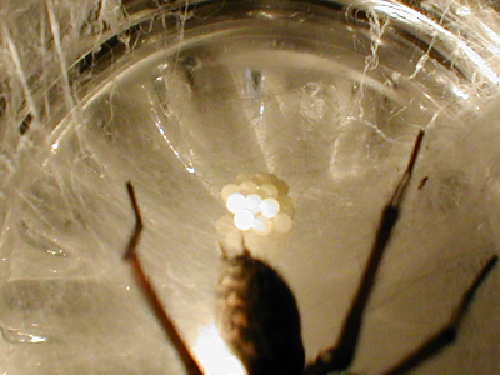 Eiablage der Tegenaria atrica